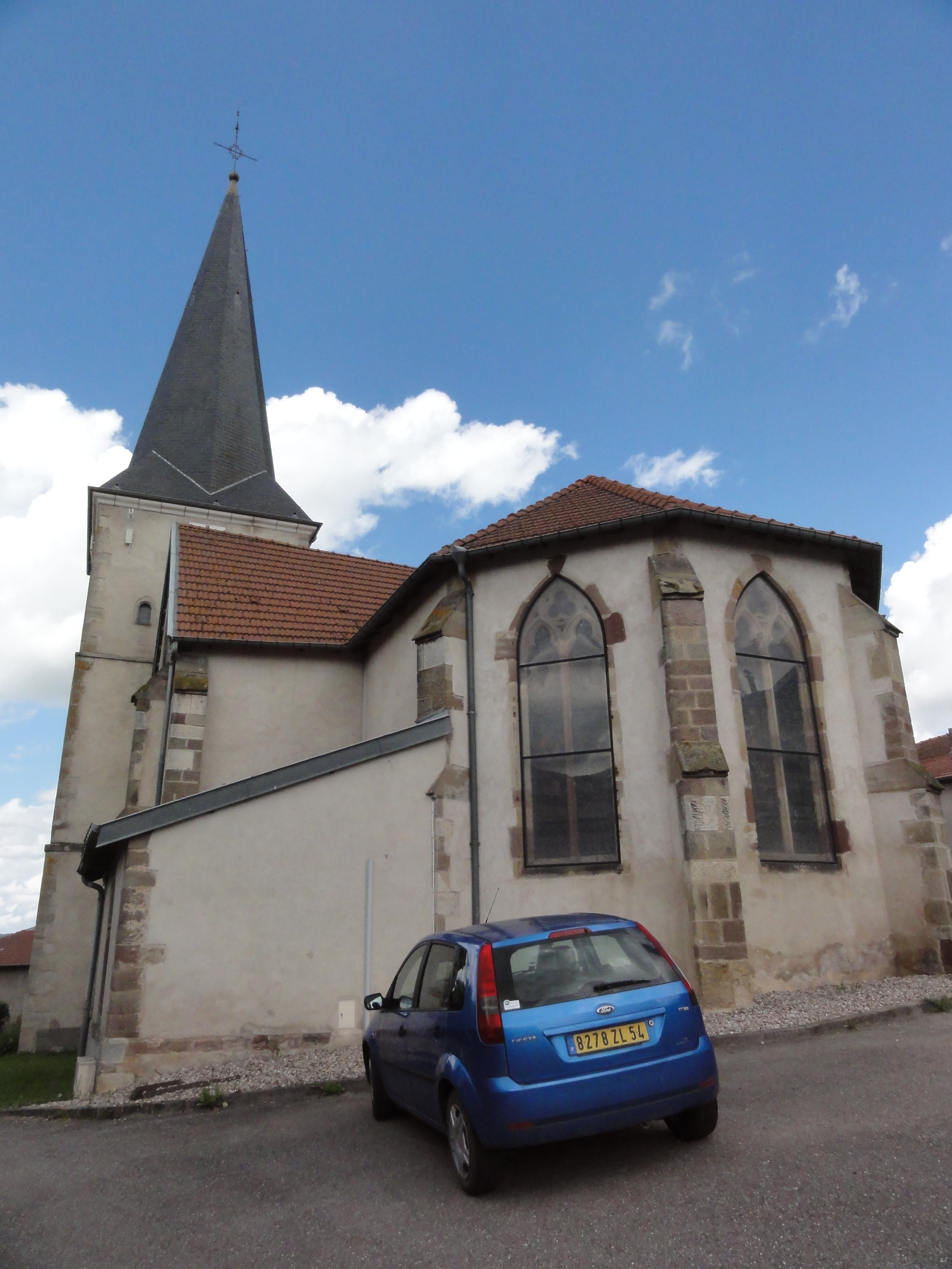 Bauzemont (M-et-M) église